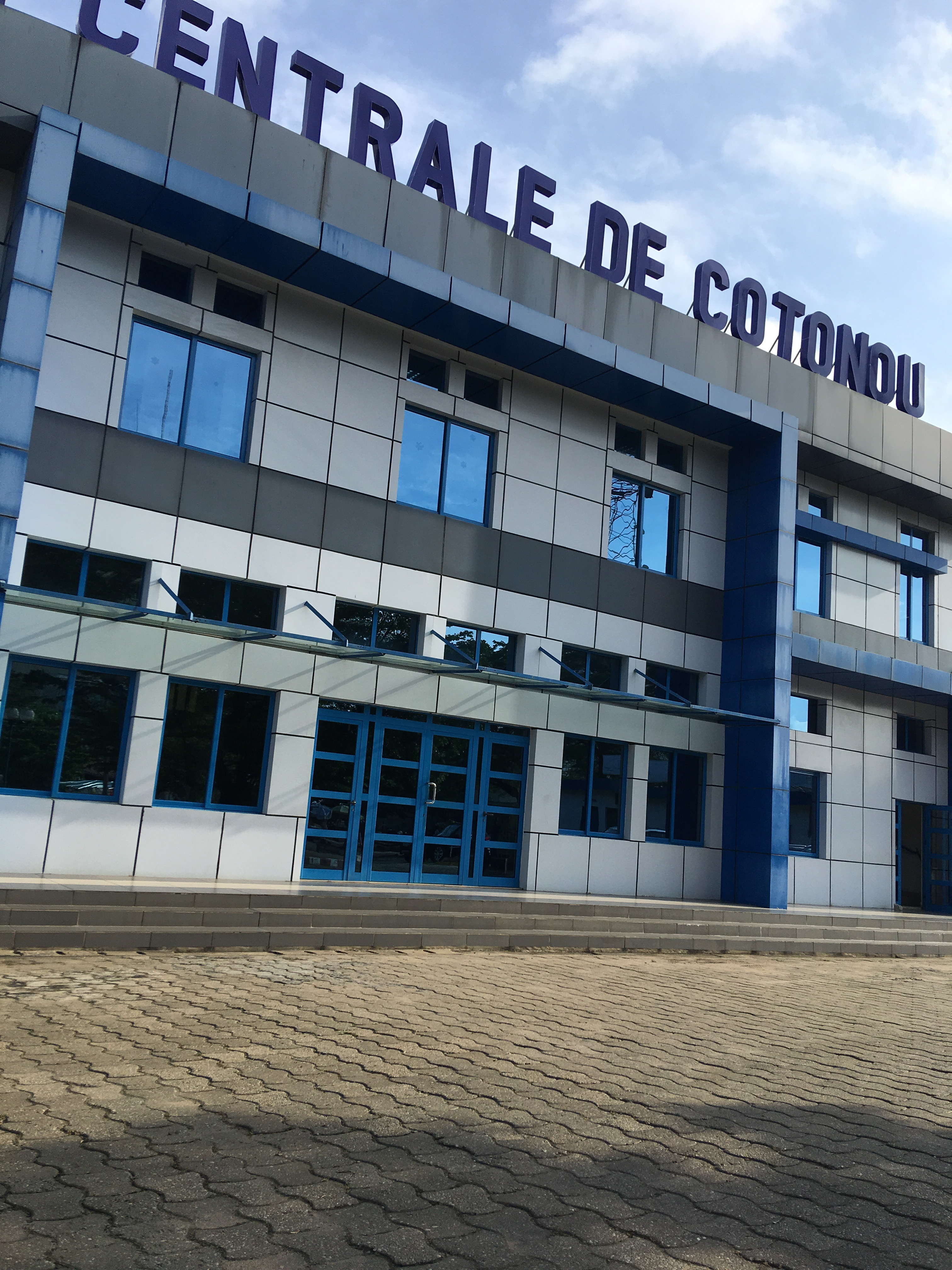 Façade de la gare centrale de Cotonou